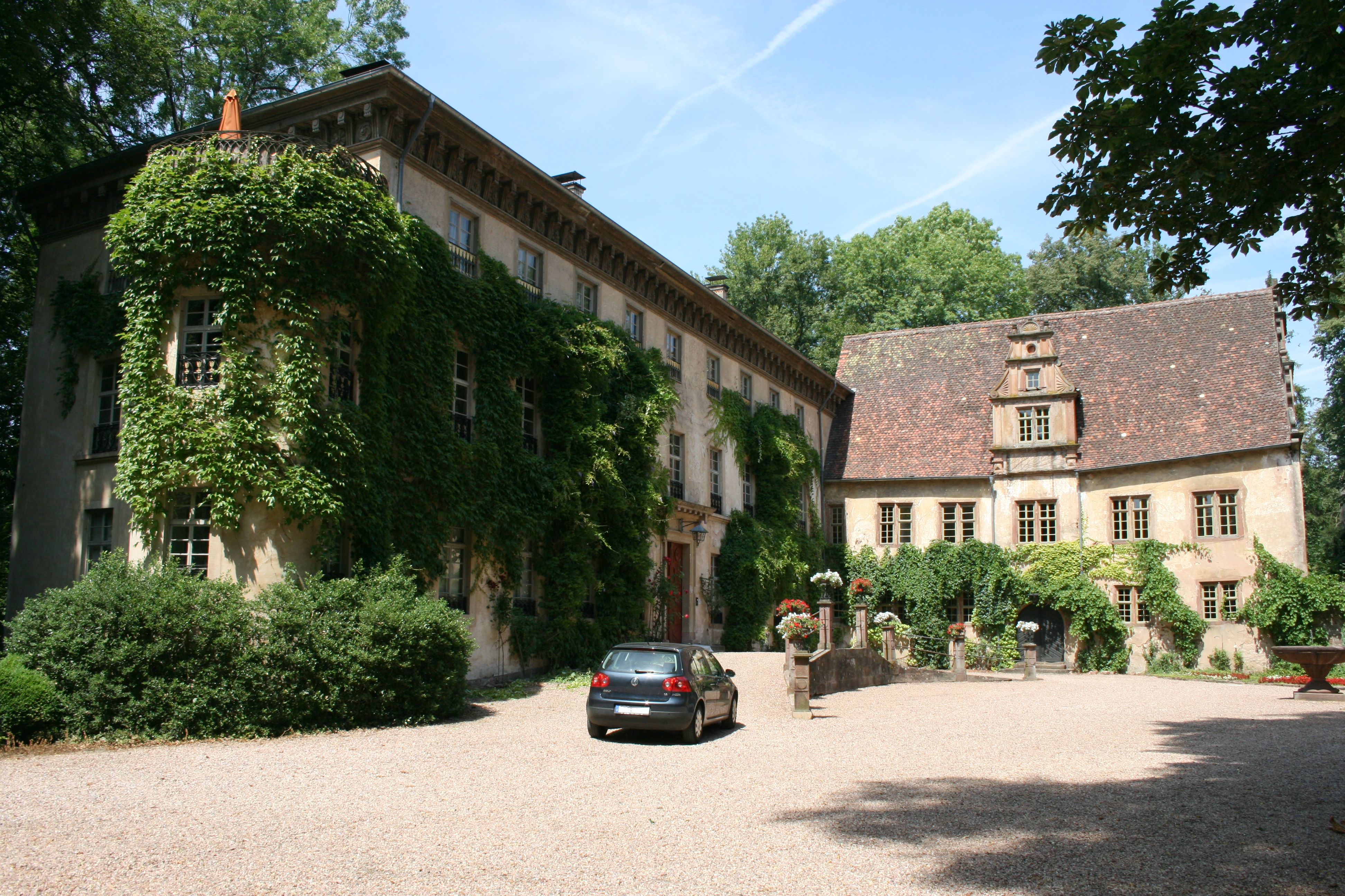 Blick in den Hof von Schloss Fürstenau auf die Gebäude der Vorburg.